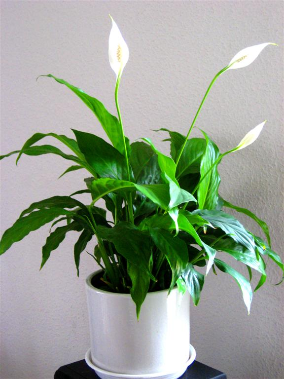 Skrzydłokwiat - Spathiphyllum floribundum